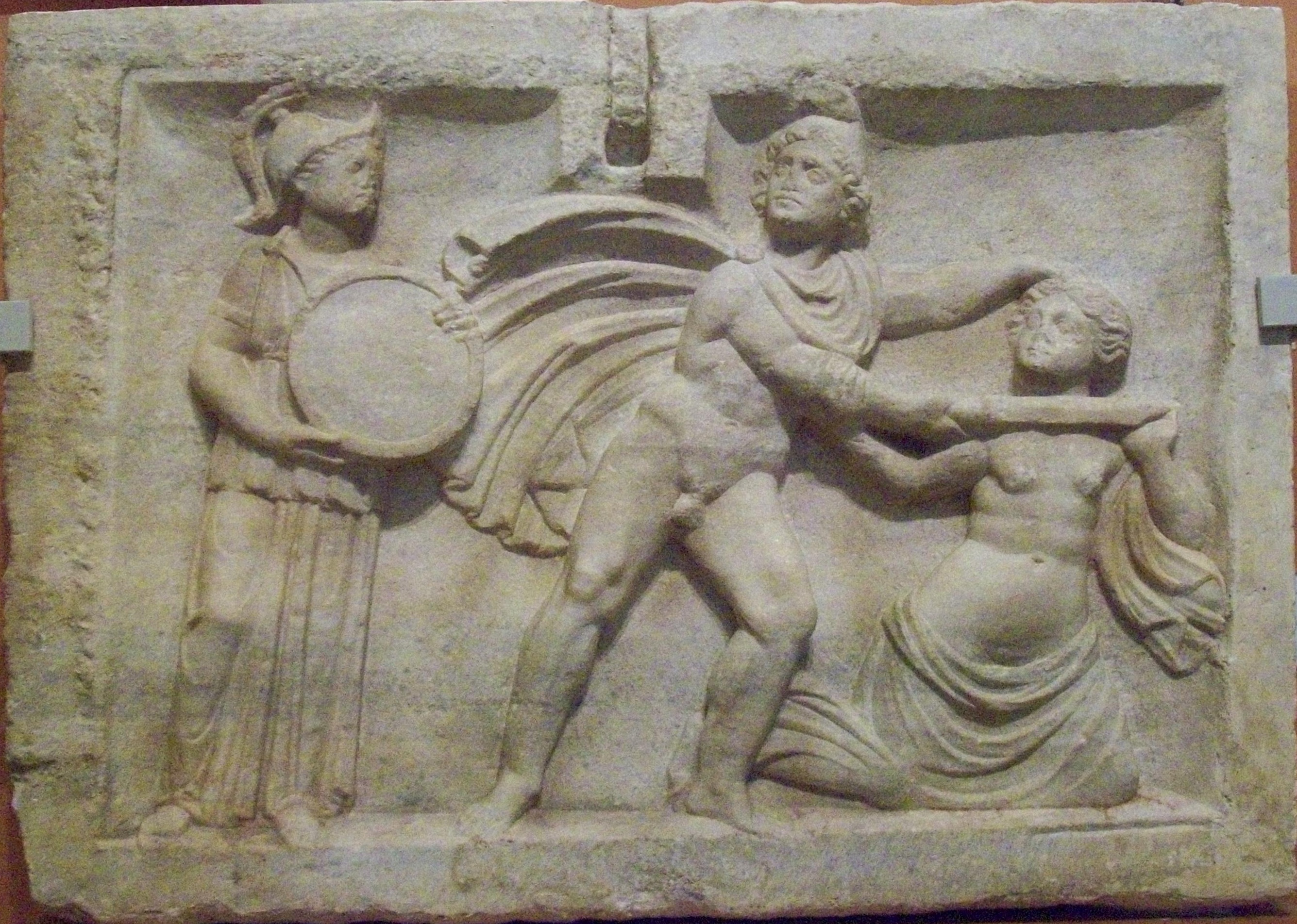 Perseus killing Medusa